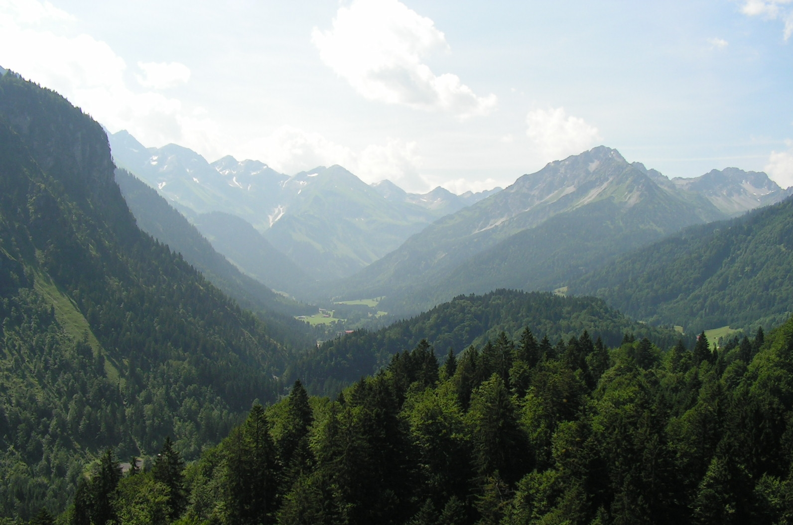 Allgaeuer Alpen. Landschaft aus Heini Klopfer Schanze.